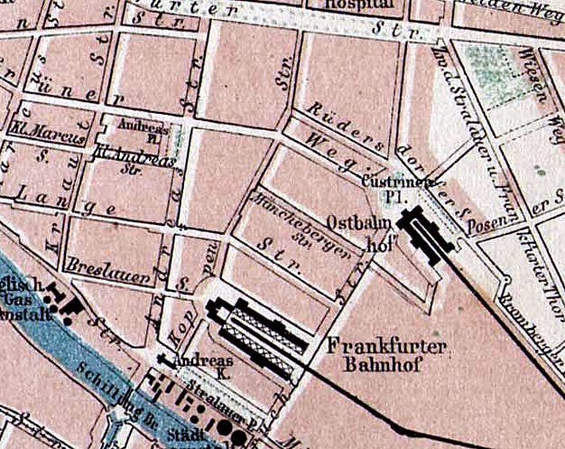 Lage des alten Ostbahnhofs auf einem alten Stadtplan